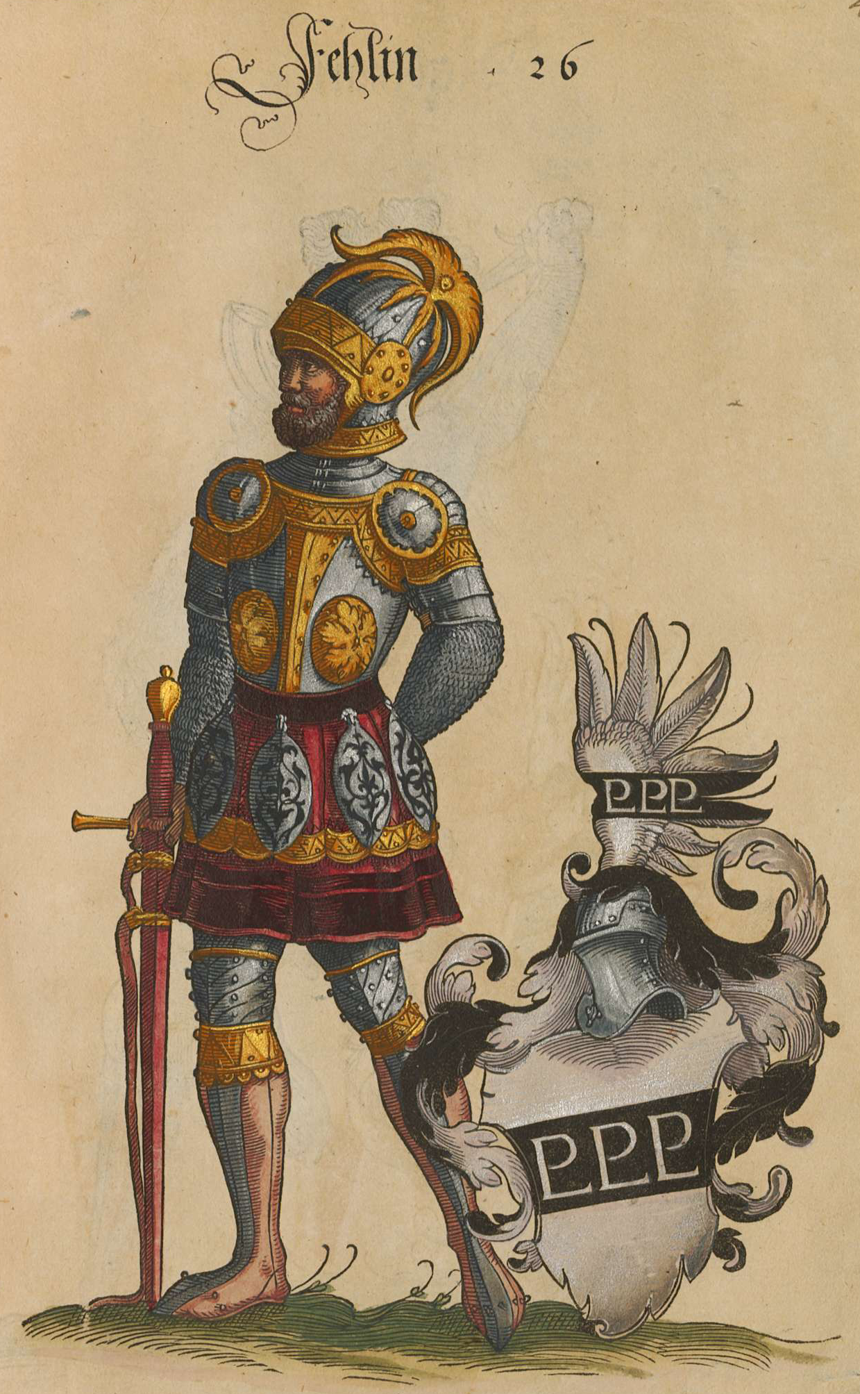 Wappen der Vöhlin, Cod.icon. 312 b, Geschlechterbuch der Stadt Augsburg, Seite 46r